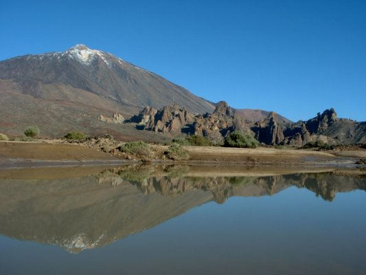 El Teide